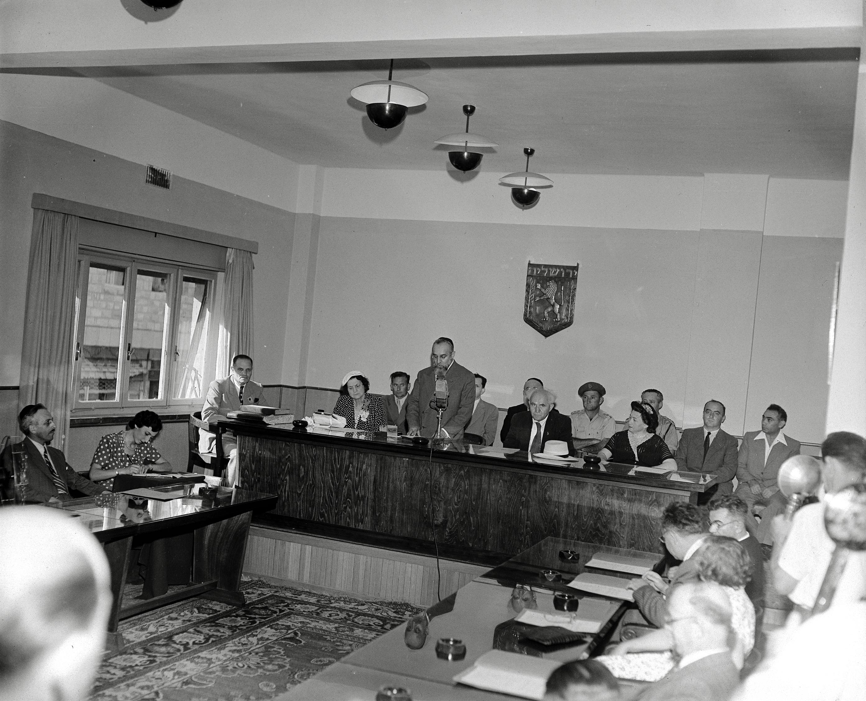 ON HIS RETURN FROM THE U.S. THE FREEDOM OF THE CITY OF JERUSALEM WAS CONFERRED UPON THE PM DAVID BEN GURION. MR. SHRAGAI MAYOR OF JERUSALEM READS THE SCROLL. טקס הענקת אזרחות כבוד של ירושלים לראש הממשלה דוד בן גוריון, ע"י ראש העיר שלמה זלמן שרגאי, עם חזרתו של ראש הממשלה מביקור בארה"ב.